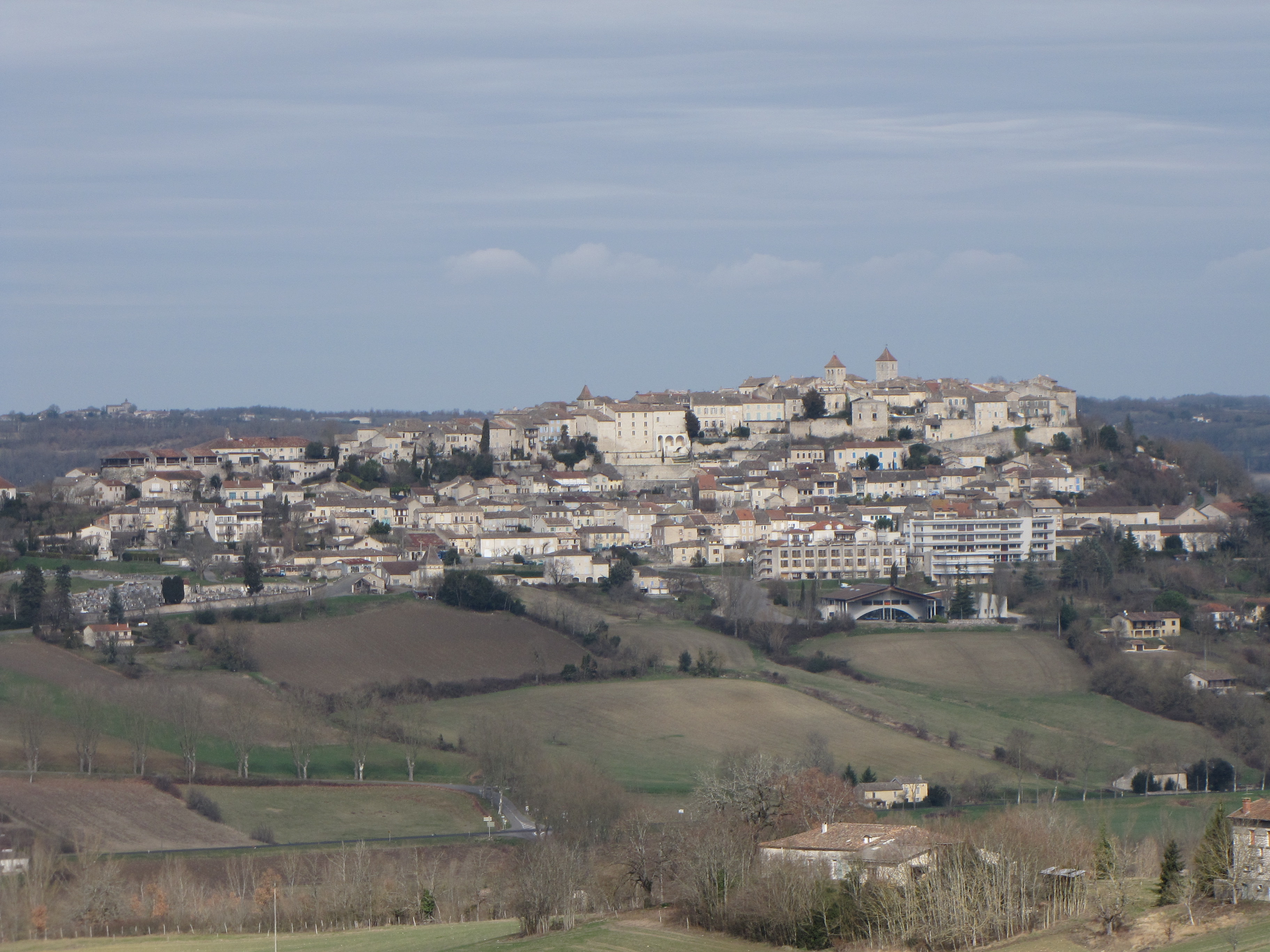 Lauzerte